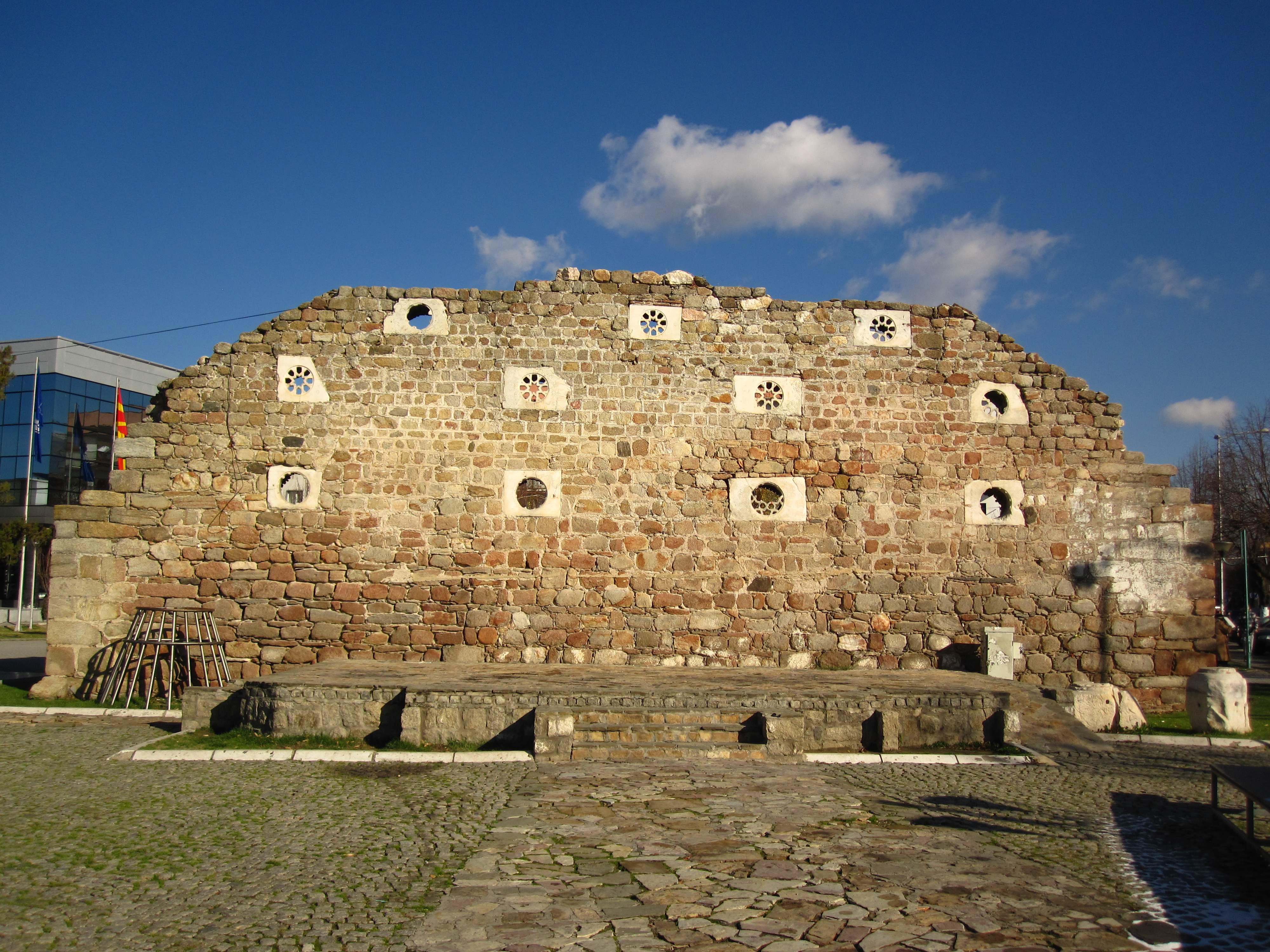 Ѕид од некогашен затвор - Прилеп